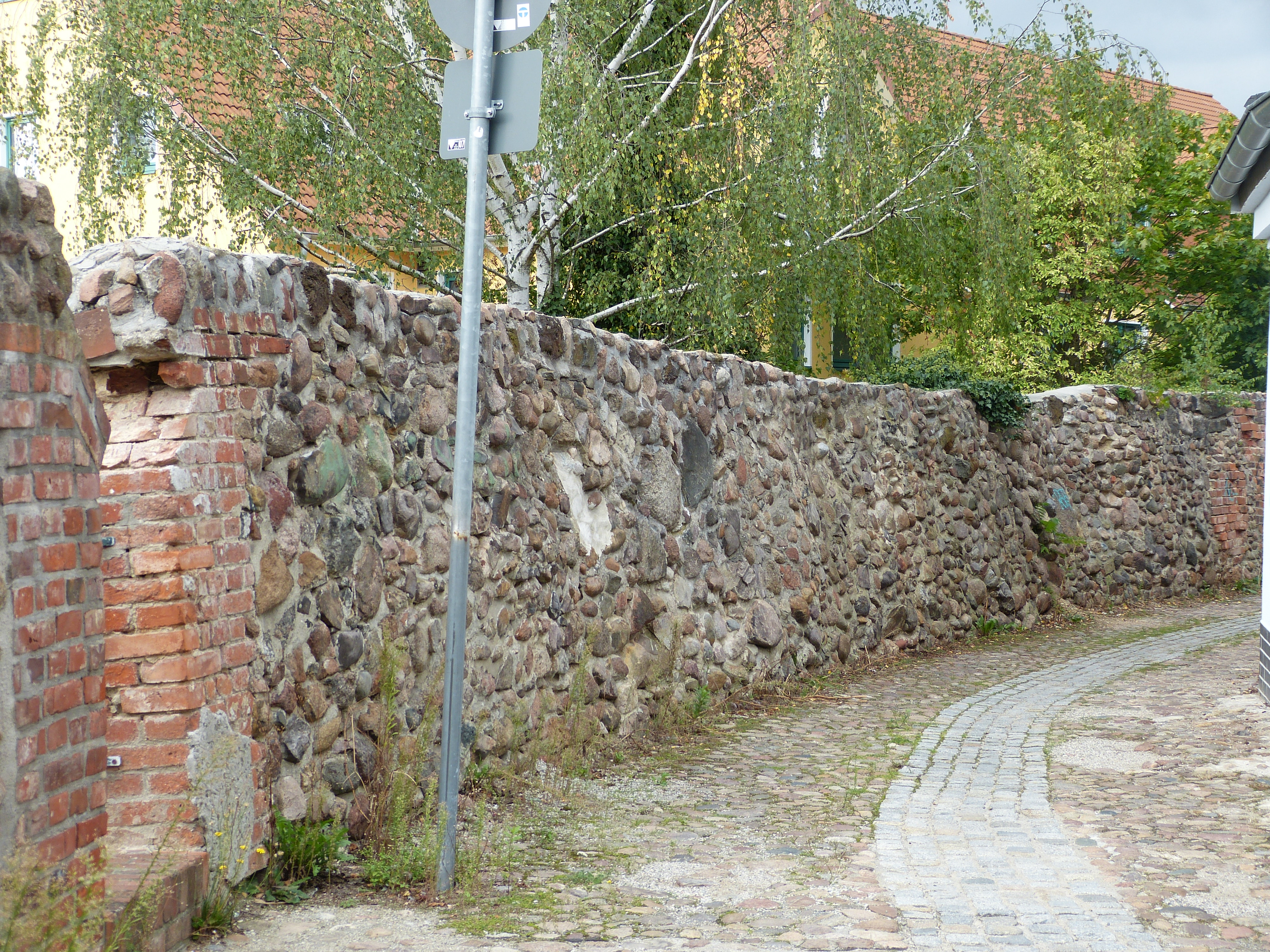 Stadtbefestigung in Gräfenhainichen nahe dem oberen Stadtturm